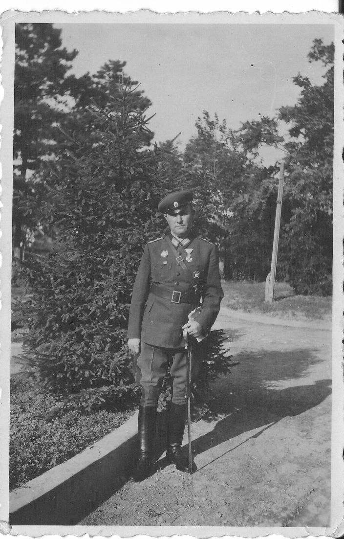 Полковник Никола Ботев - командир на 31 пехотен полк